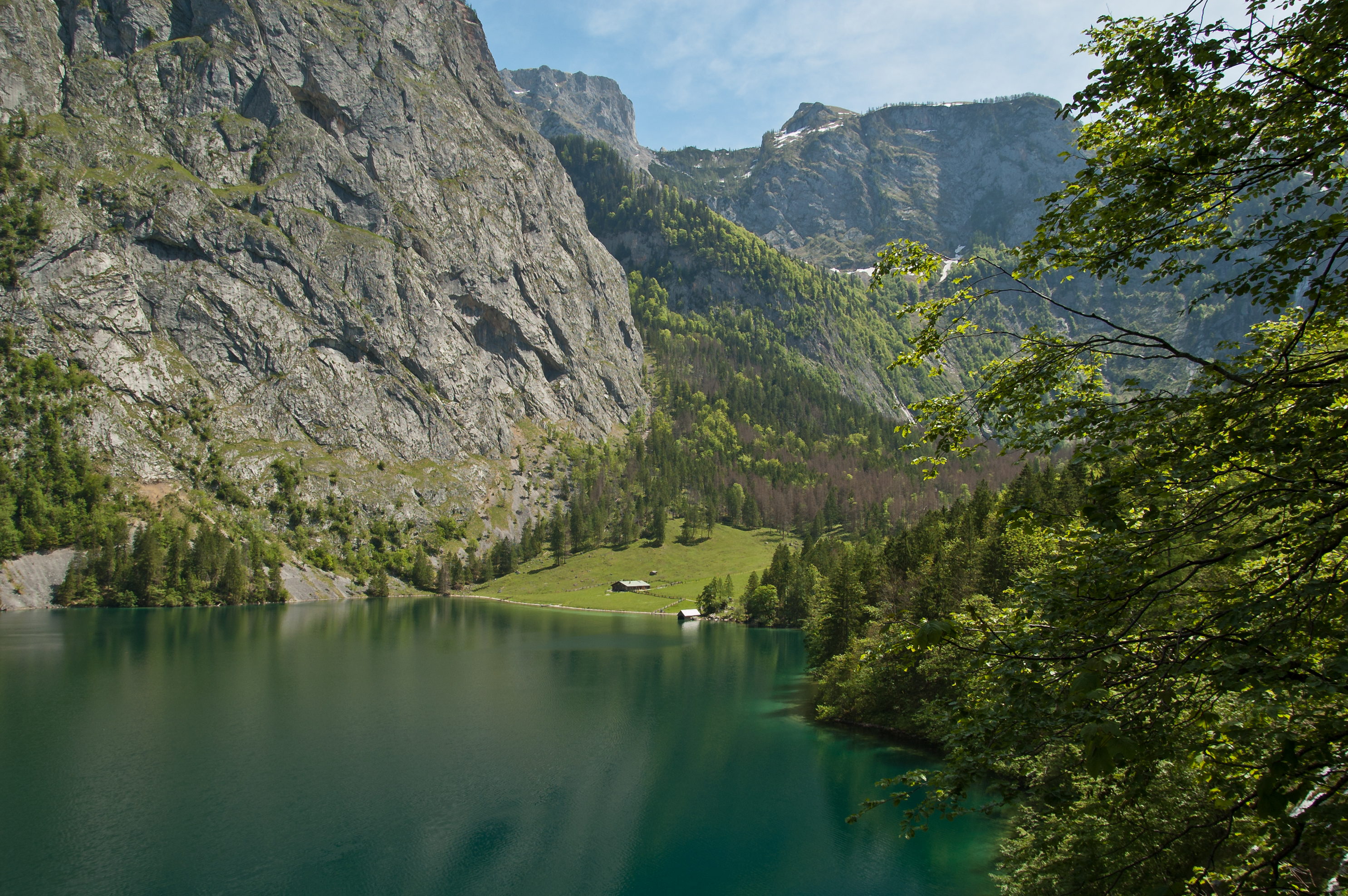 Fischunkelalm und Bootshaus am Südostufer des Obersees, gesehen vom Steig in der Wand an der Südwestseite des Obersees aus